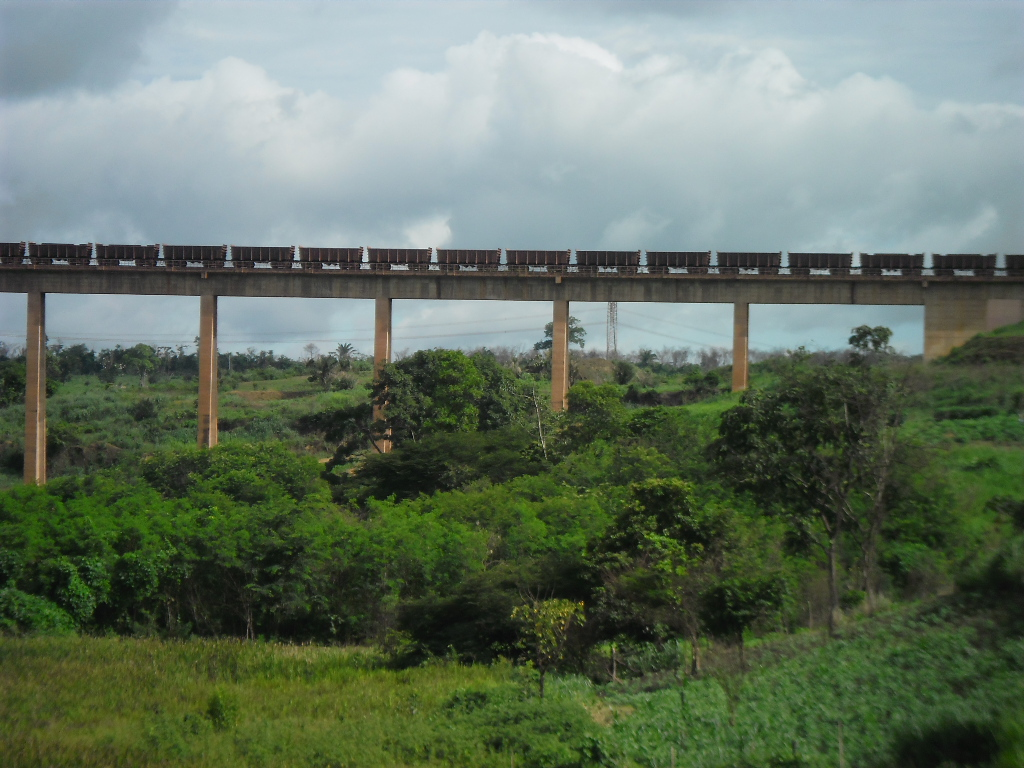 açailandia ma